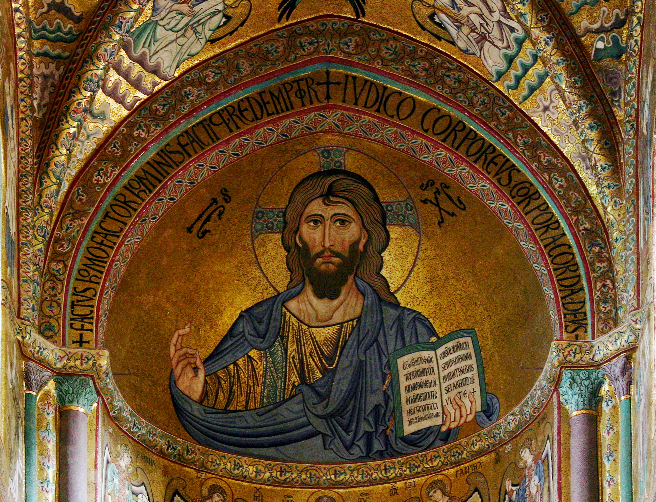 Cathedral of Cefalù